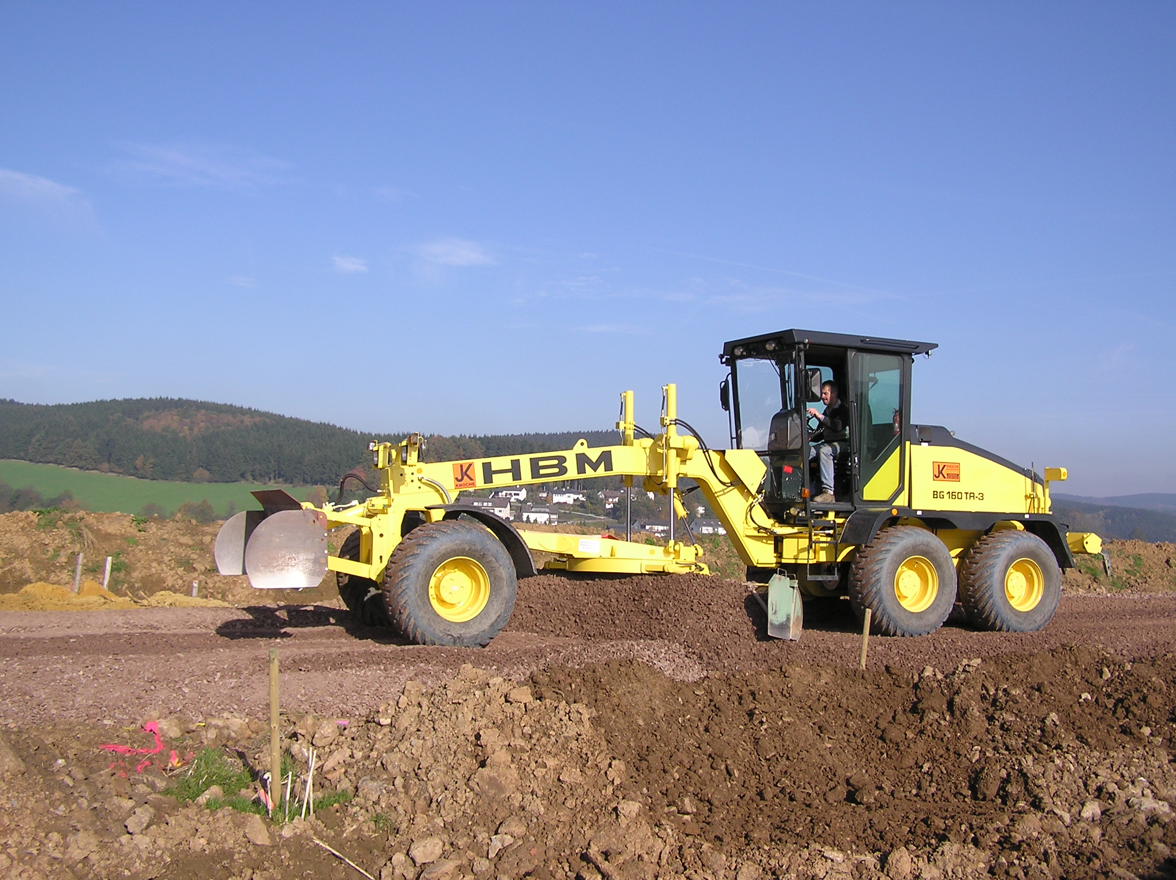 HBM BG 160 TA-3